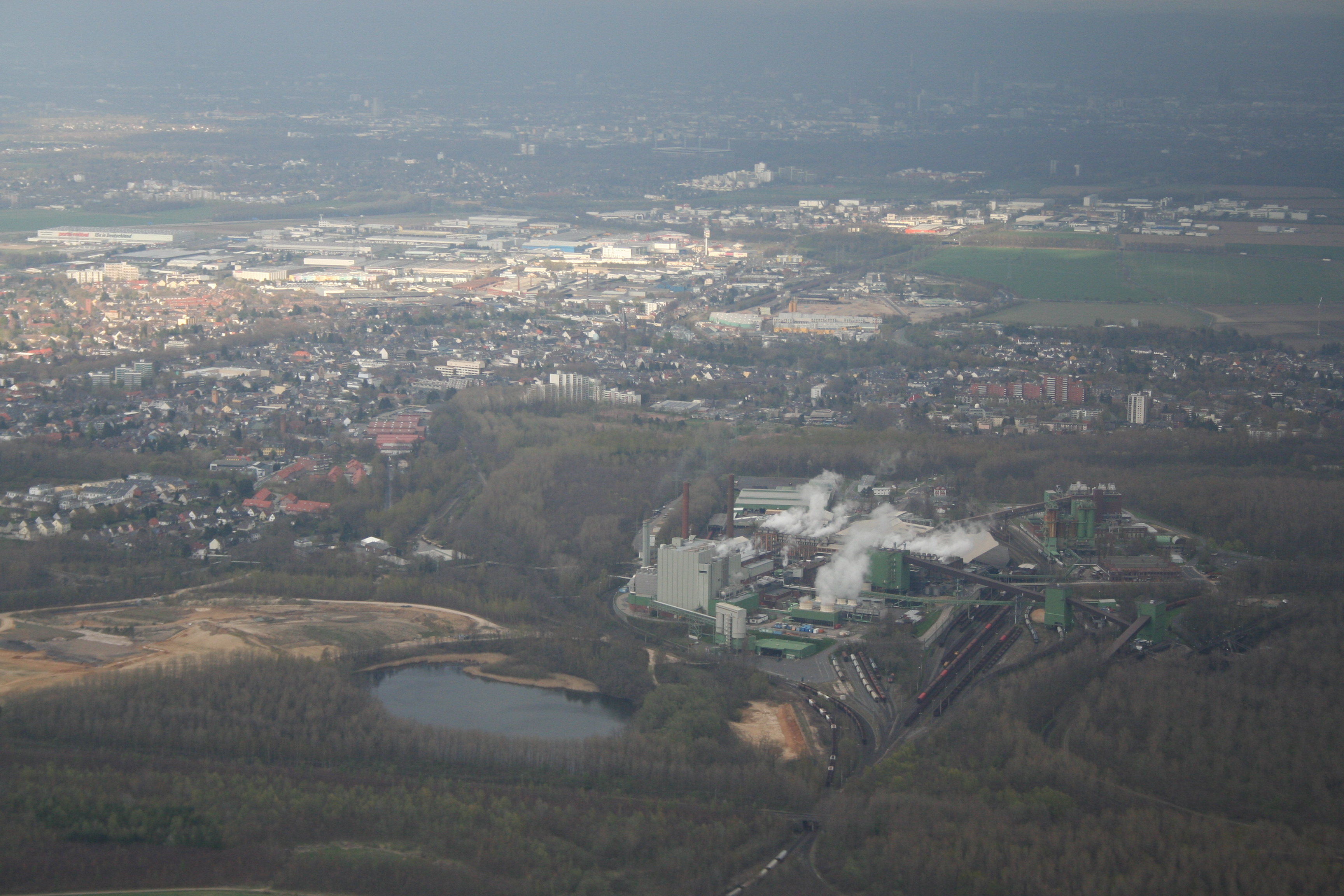 Brikettfabrik Wachtberg am 12.04.2008 von Westen aus mit Blick über Frechen